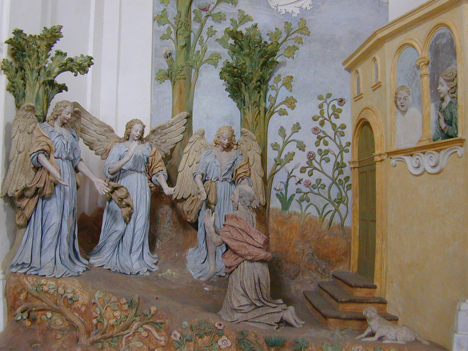 Sacro Monte di Ghiffa. Figure.